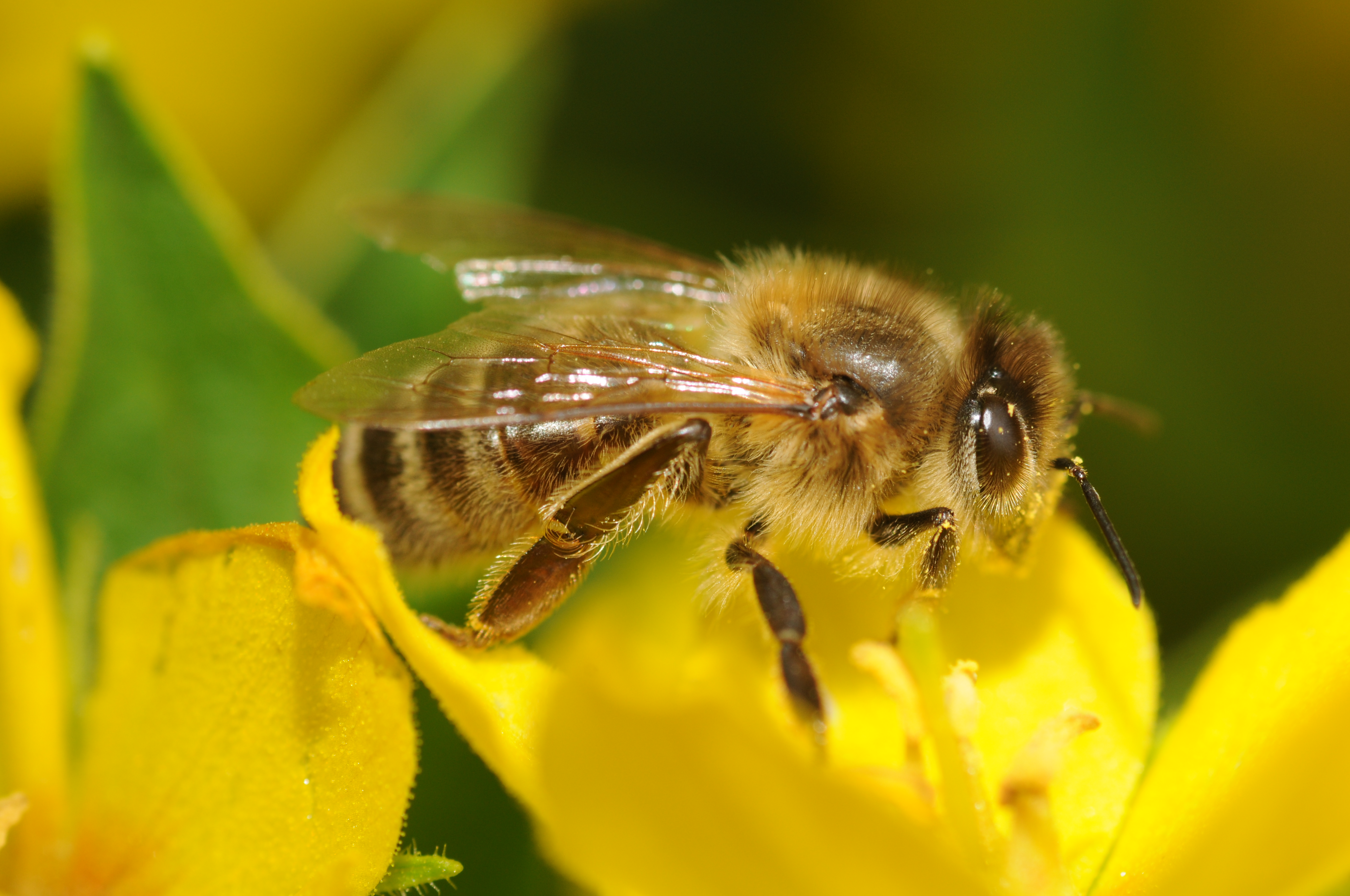 Abeille européenne.